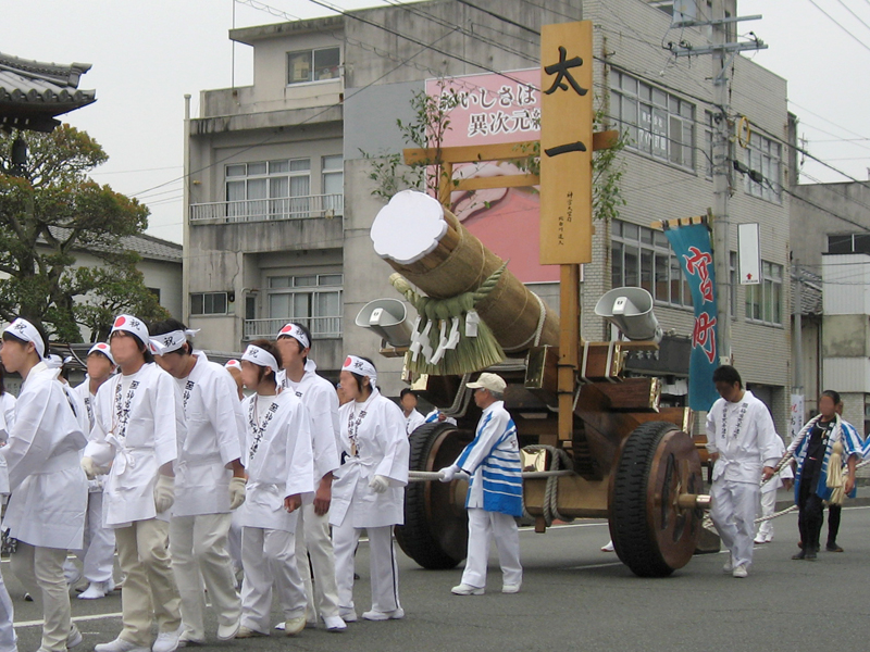 Hoeisya for Ichinichi-Shinryomin of Okihikigyoji(Okabiki) 御木曳行事における一日神領民の奉曳車三重県伊勢市宮町にて撮影